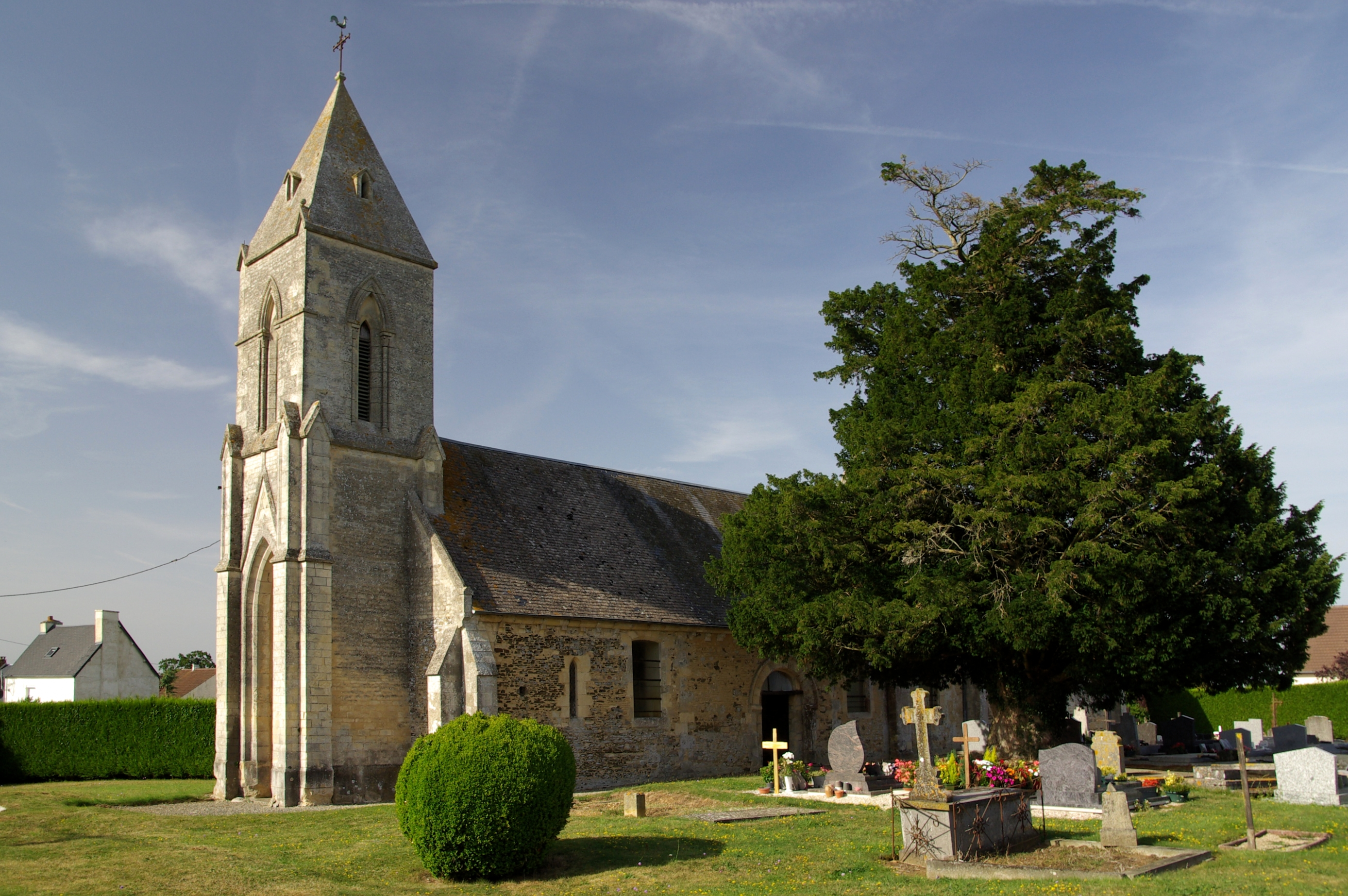 L'église Notre-Dame à Leffard, Calvados.